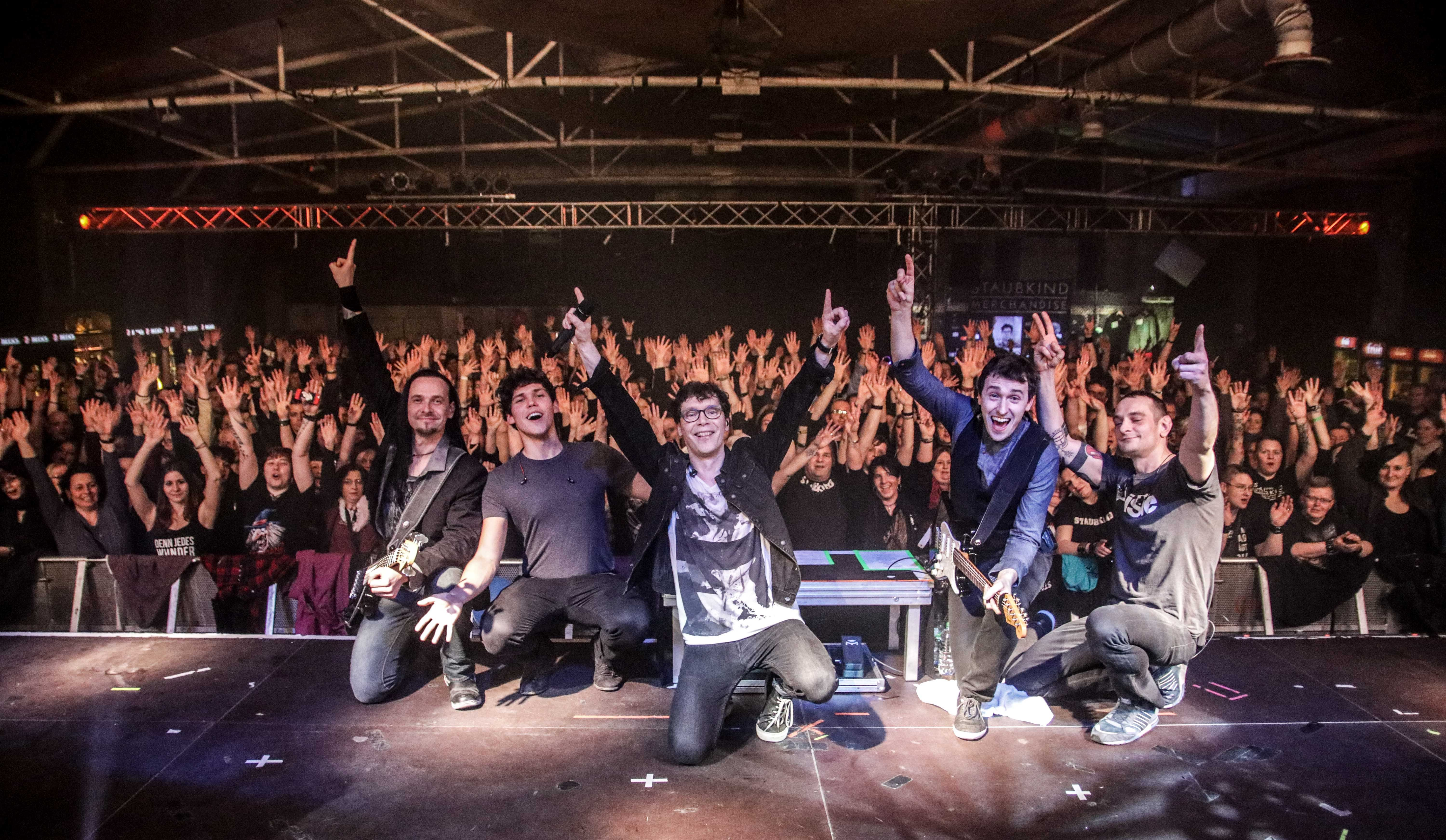 Staubkind, Köln, 03.03.2017